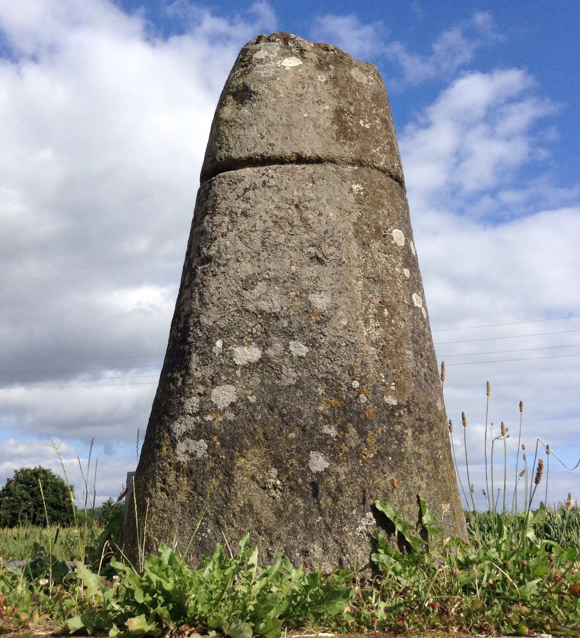 Stèle dite du « Moustoir » de l'âge du Fer, donc datant de l'époque protohistorique, taillée dans du granit et de forme tronconique. Hauteur 1,59 m (Cf. Jean-Yves Éveillard, « Notes sur quelques stèles inédites des environs de Rostrenen », dans Mémoires de la Société d'Émulation des Côtes-du-Nord, n° 100, 1971 [1972] p. 24. Carte archéologique de la Gaule : 22. Côtes-d'Armor, 2002, p. 217 et fig. 209). Elle est localisée au carrefour de la D 76 et du chemin du Moustoir, dans la commune de Plélauff (Côtes-d'Armor). Sans référence scientifique, elle aurait parfois été considérée hypothétiquement comme une borne milliaire.